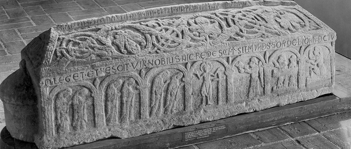 Botkyrkamonumentet, originalet